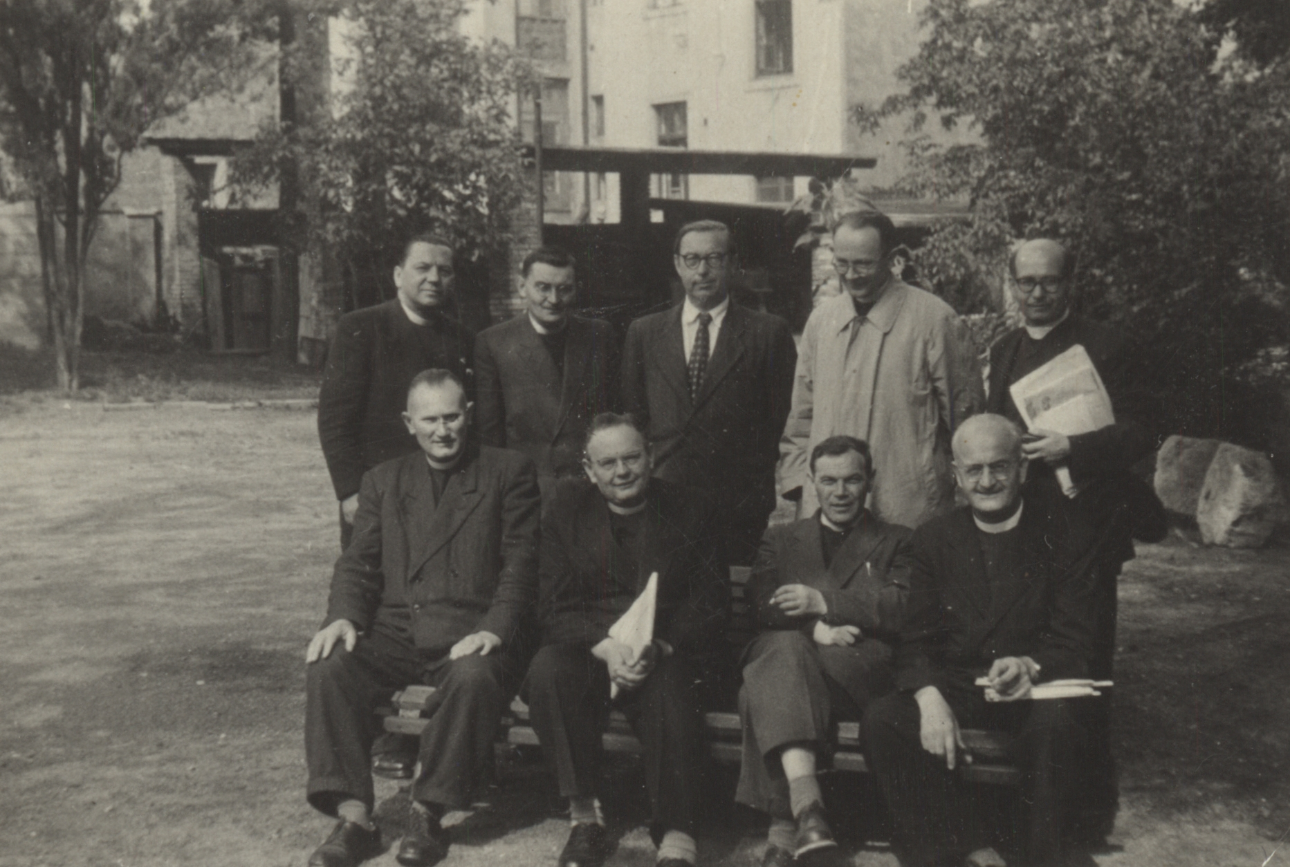 Profesorský sbor Cyrilometodějské bohoslovecké fakulty v Litoměřicích v jarním semestru mezi lety 1954-1956. Pánové na fotografii jsou stojící zleva: prof. Jaroslav Kouřil (pastorální teologie), prof. František Kotalík (Starý zákon), František Doubek (praktické otázky lidové demokracie), prof. Josef Kubalík (fundamentální teologie), prof. Jaroslav Michal (kanonické právo). Sedící zleva: prof. Antonín Salajka (dogmatika), prof. Jan Merell (děkan fakulty, Nový zákon), prof. František Panuška (v letech 1956-1959 rektor semináře, filosofie), prof. Václav Bartůněk (církevní dějiny).